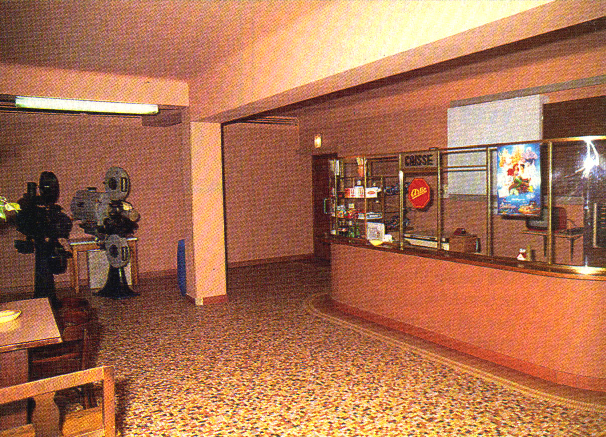 Kursaal - Entrée mat der Keess